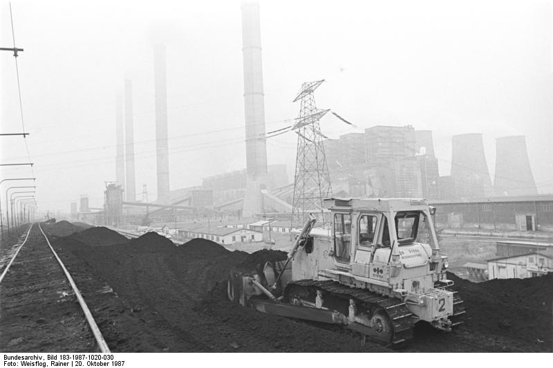 ADN-ZB/Weisflog/20.10.1987/ Bez. Cottbus: Woche der Winterbereitschaft/ Im Großkraftwerk Boxberg ist das Aufschütten von zusätzlichen Kohlehalden fast abgeschlossen. Mit der damit geschaffenen Brennstoffreserve von rund 300 000 Tonnen Kohle kann der größte Energieerzeuger der DDR mehr als eine Woche arbeiten. Bis zu der am 10.10.1987 begonnenen Woche der Winterbereitschaft haben die Energiearbeiter im Kombinat Braunkohlenkraftwerke etwa vier Fünftel der für dieses Jahr geplanten 121 Reparaturobjekte abgeschlossen.